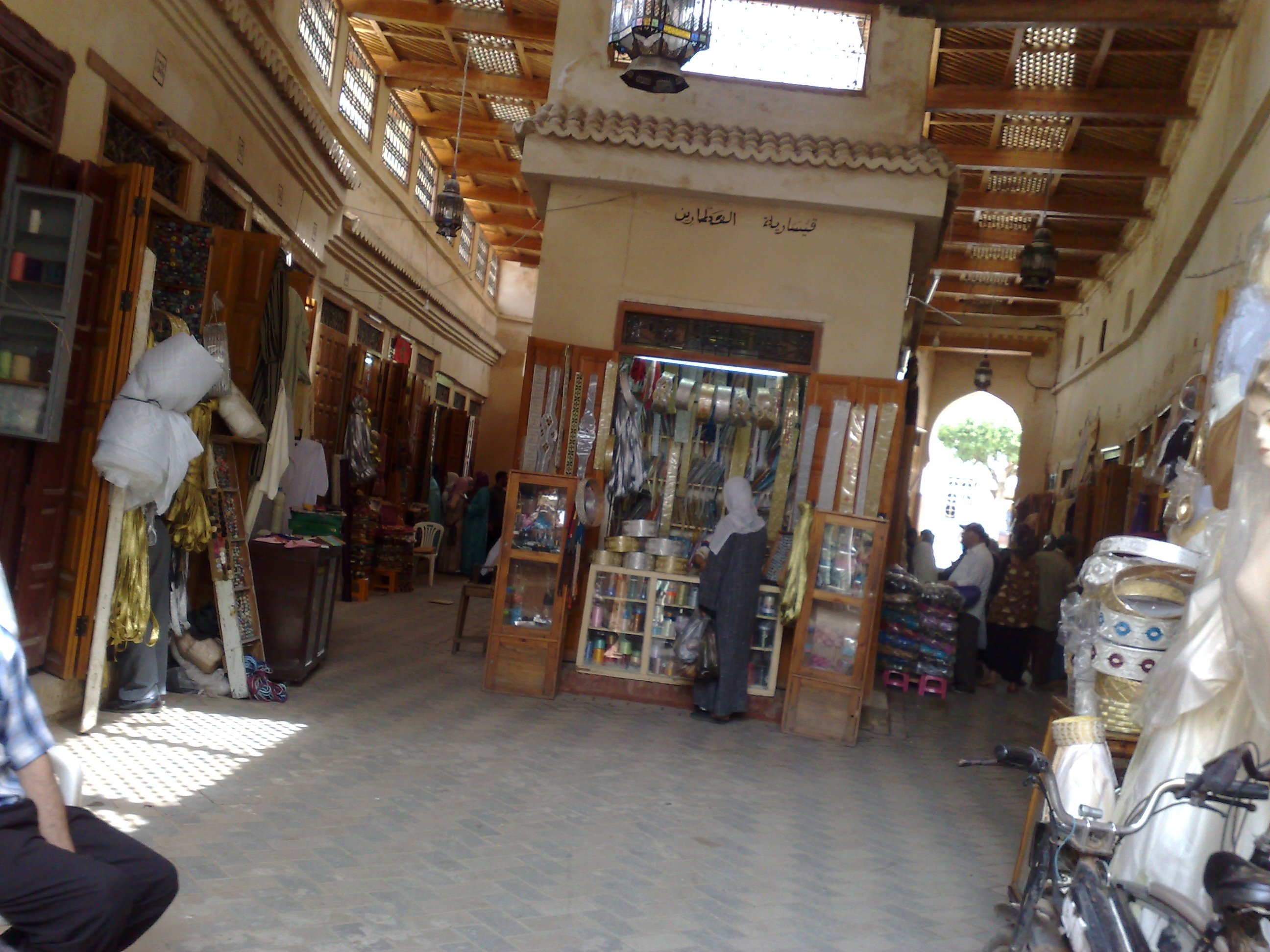 سوق قديم بمدينة القصر الكبير